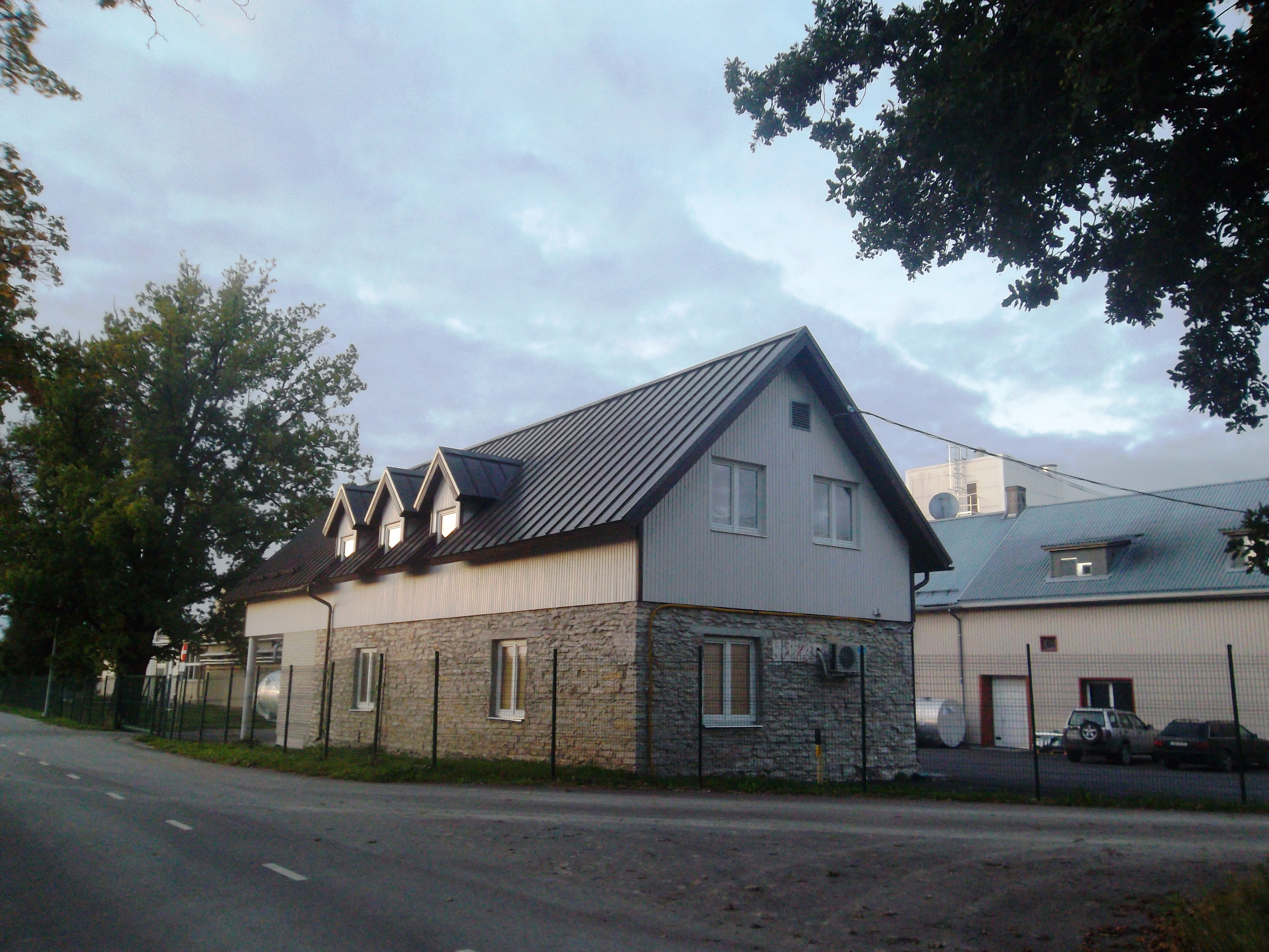 Главные здания дрожжевого завода в Салутагузе.